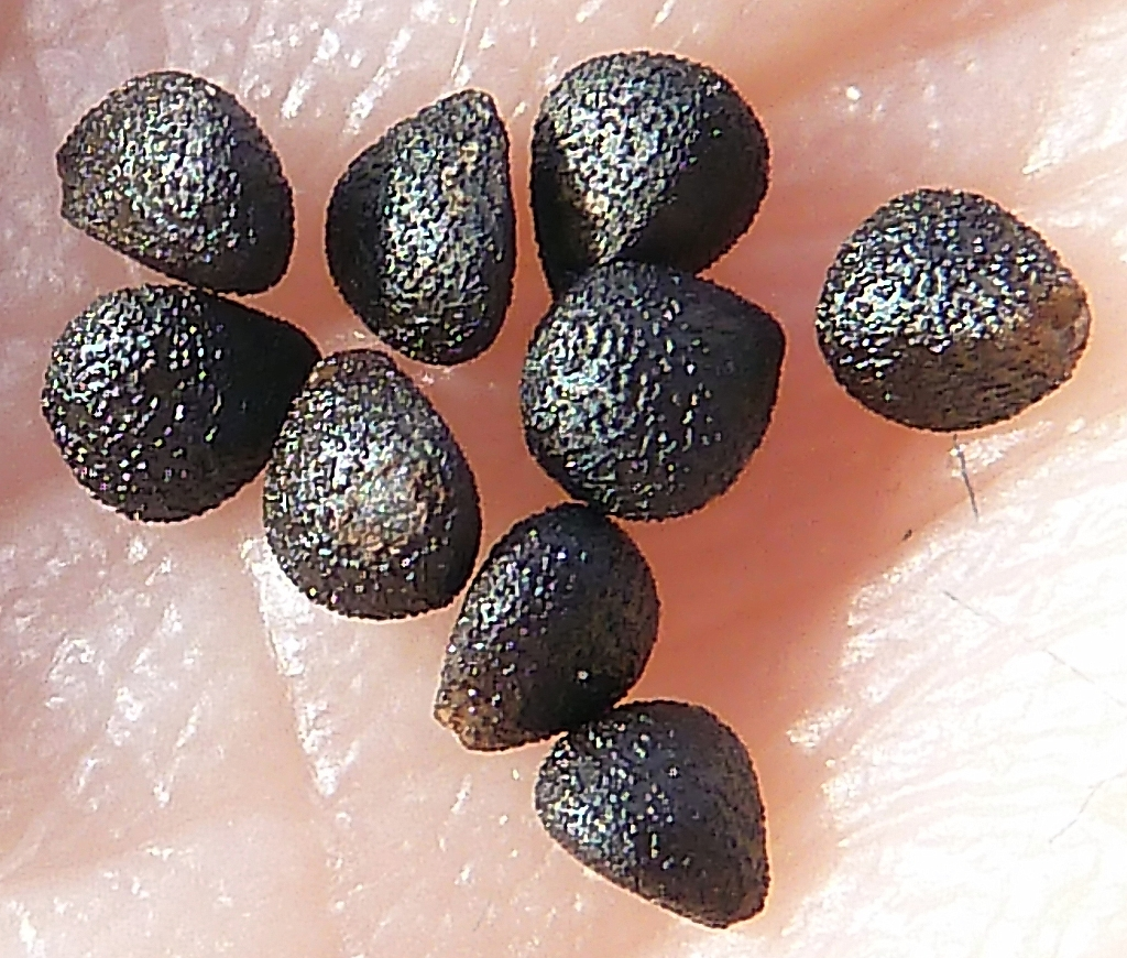 Stachys ocymastrum (Rabo de zorra) : Semillas - La Huerta, Albatera (Alicante, España).